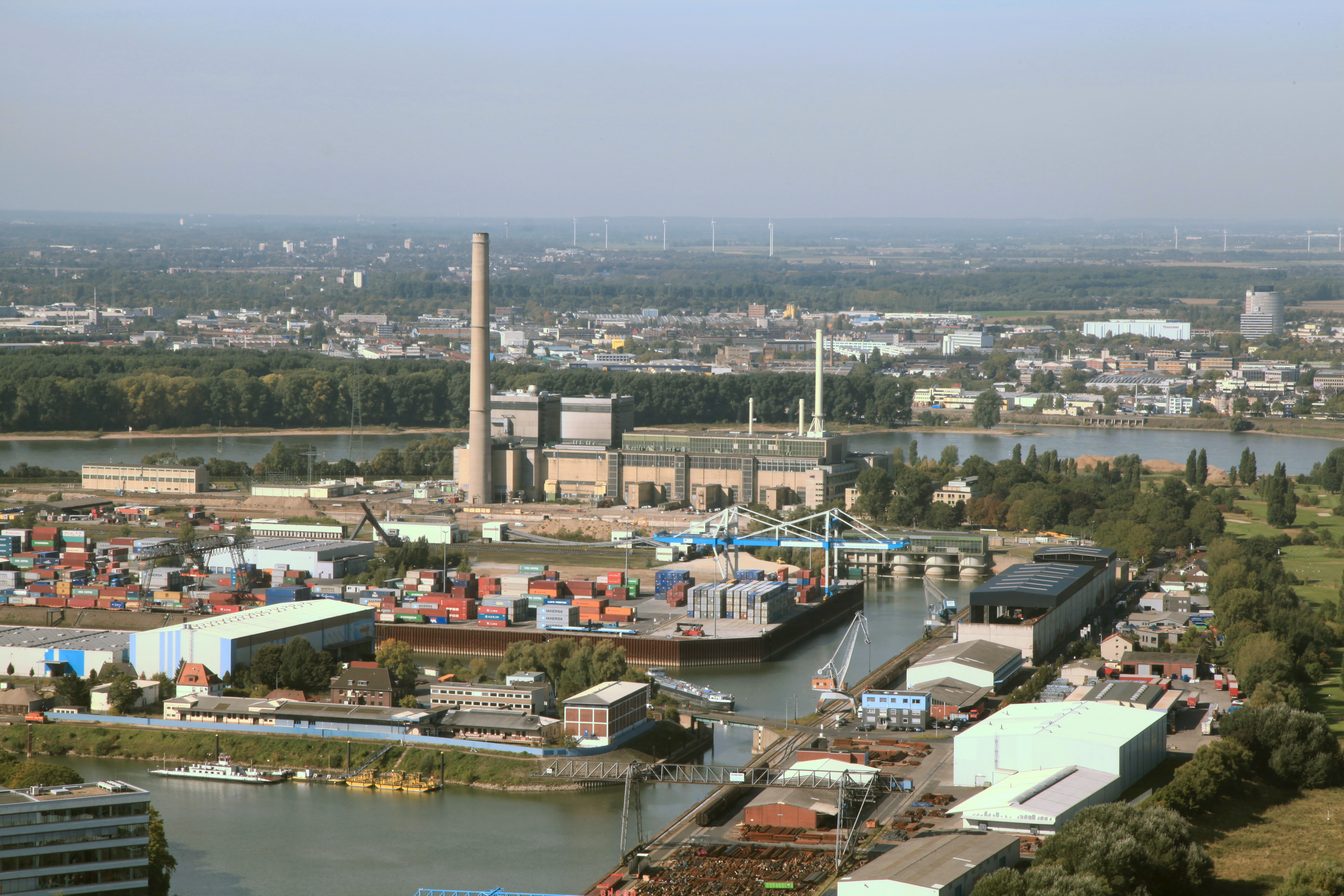 Blick vom Rheinturm zum Düsseldorfer Hafen in Düsseldorf